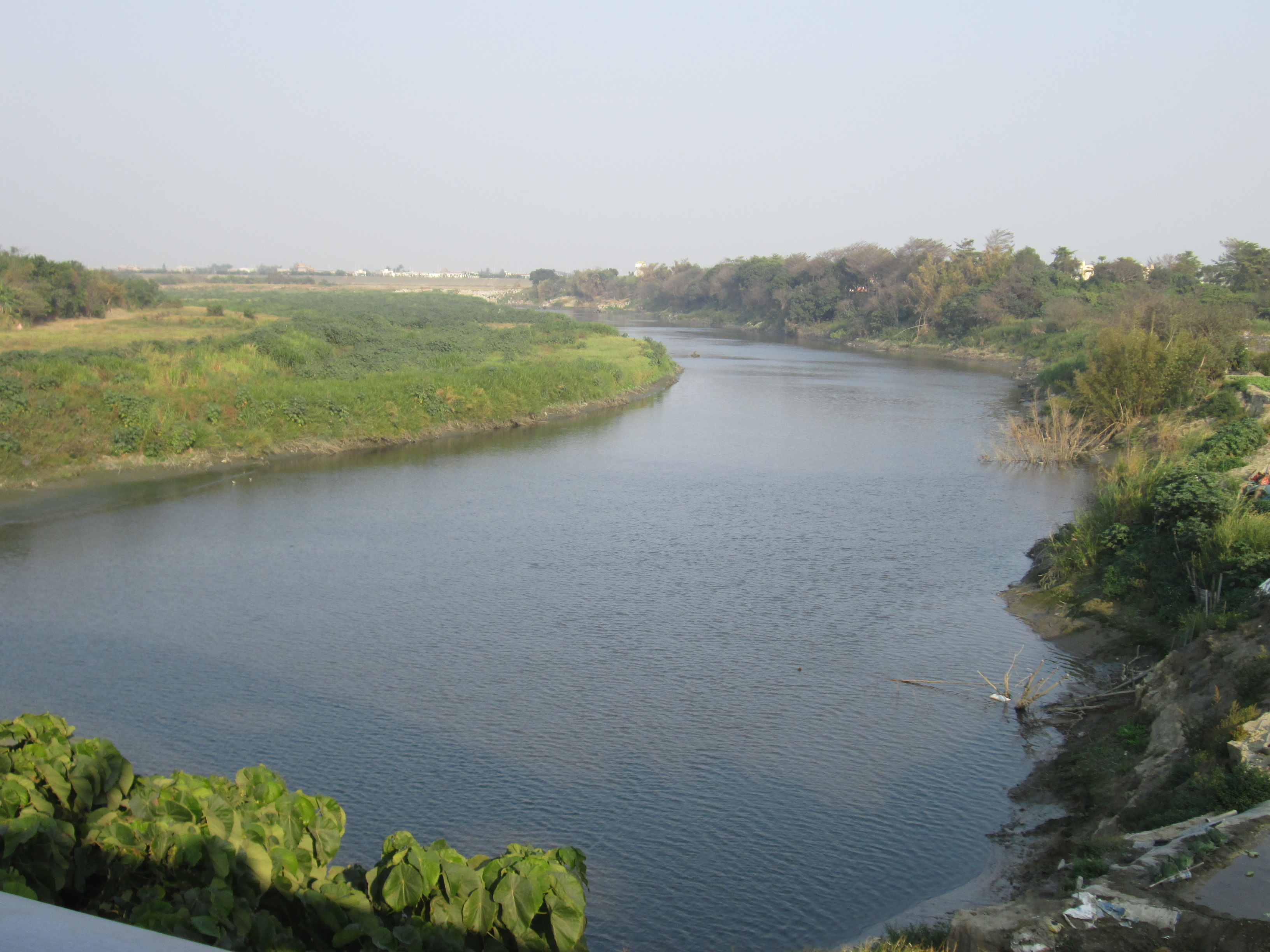 嘉義縣六腳鄉 北港溪